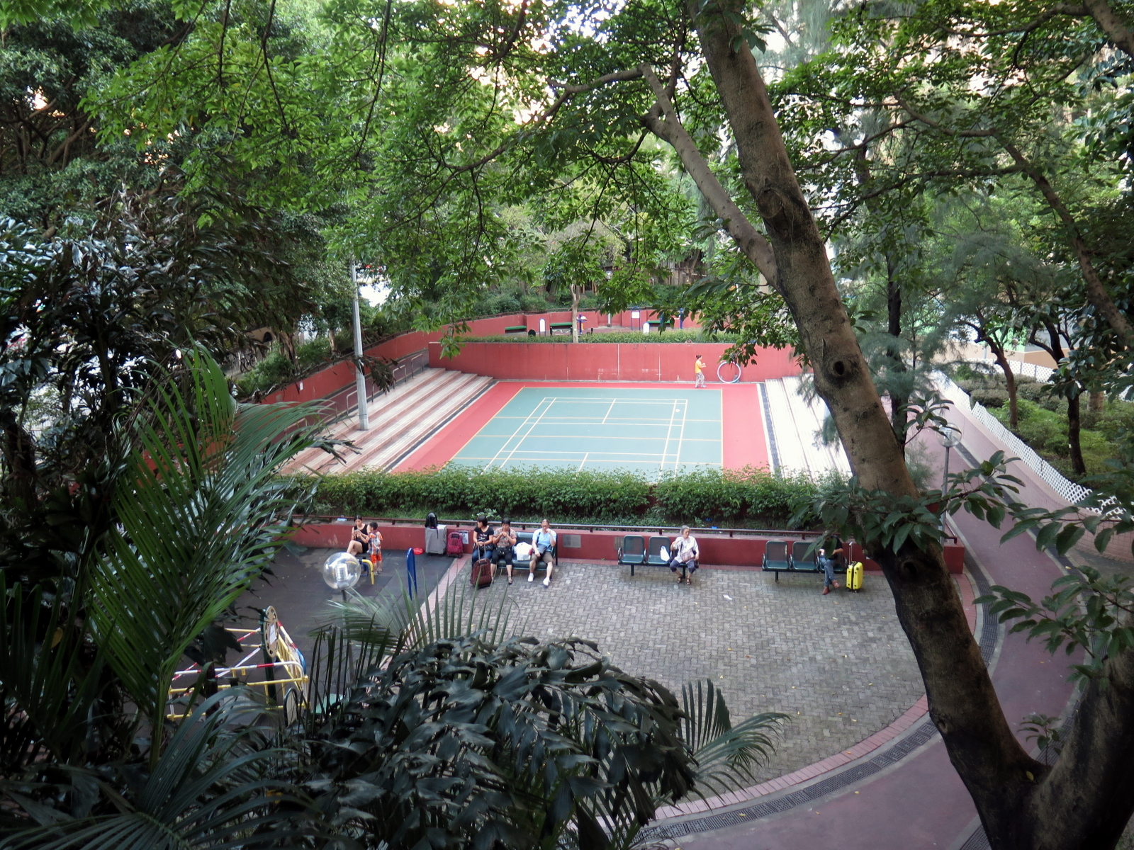 Choi Yuen Estate Badminton Court